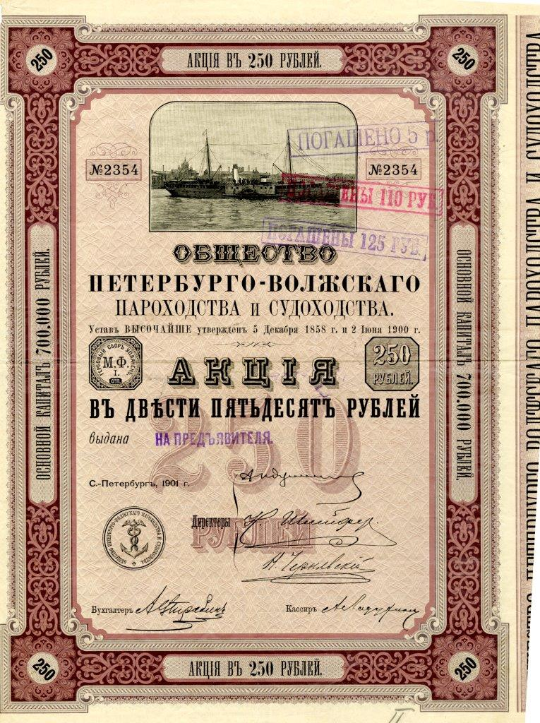 Акция в 250 руб. на предъявителя Общества Петербурго-Волжского пароходства и судоходства. С.-Петербург, 1901 г.